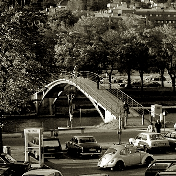 Från Fisktorget. Selångeråns södra sida.